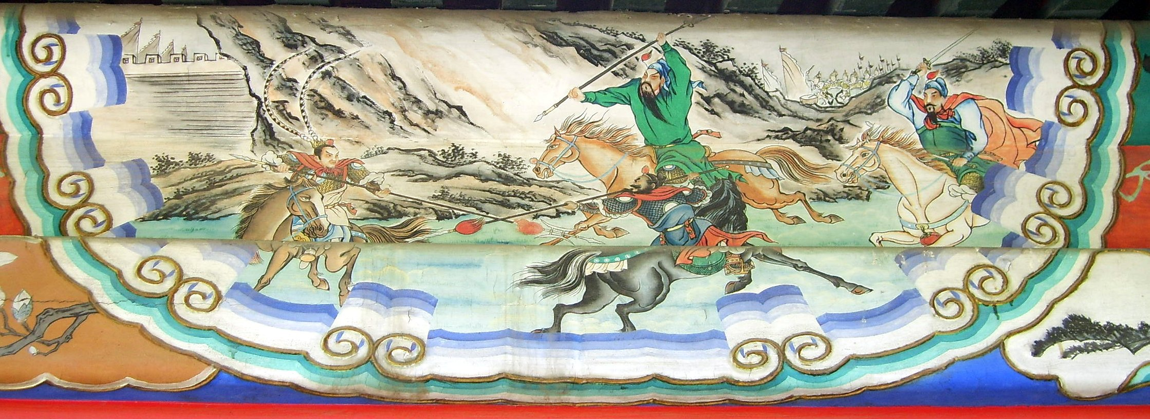 Tam anh chiến Lã Bố - Trường lang Di Hòa Viên